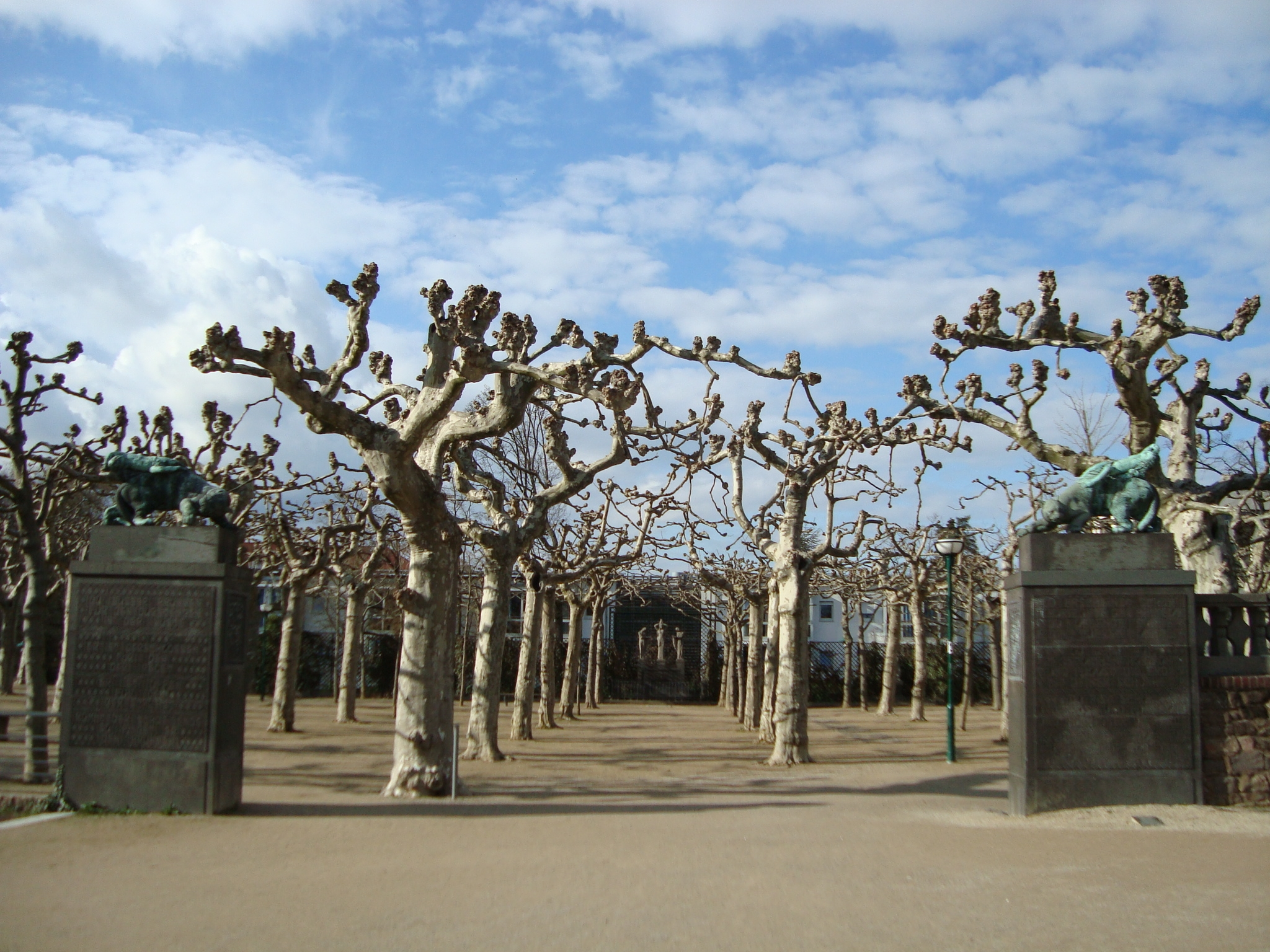 Die tuin by Mathildenhöhe is vernoem na Mathilde Karoline Friederike von Wittelsbach, die vrou van groothertog Ludwig die 3de.